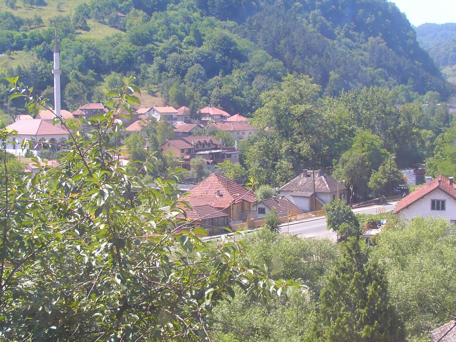 Šeher ili Gornji šeher je mjesna zajednica na području grada Banje Luke. Ova mjesna zajednica je smještena na obalama Vrbasa u južnom dijelu (uže) teritorije grada. Ovdje se nalazi 8 izvora termalne vode sa temperaturom do 32°C.